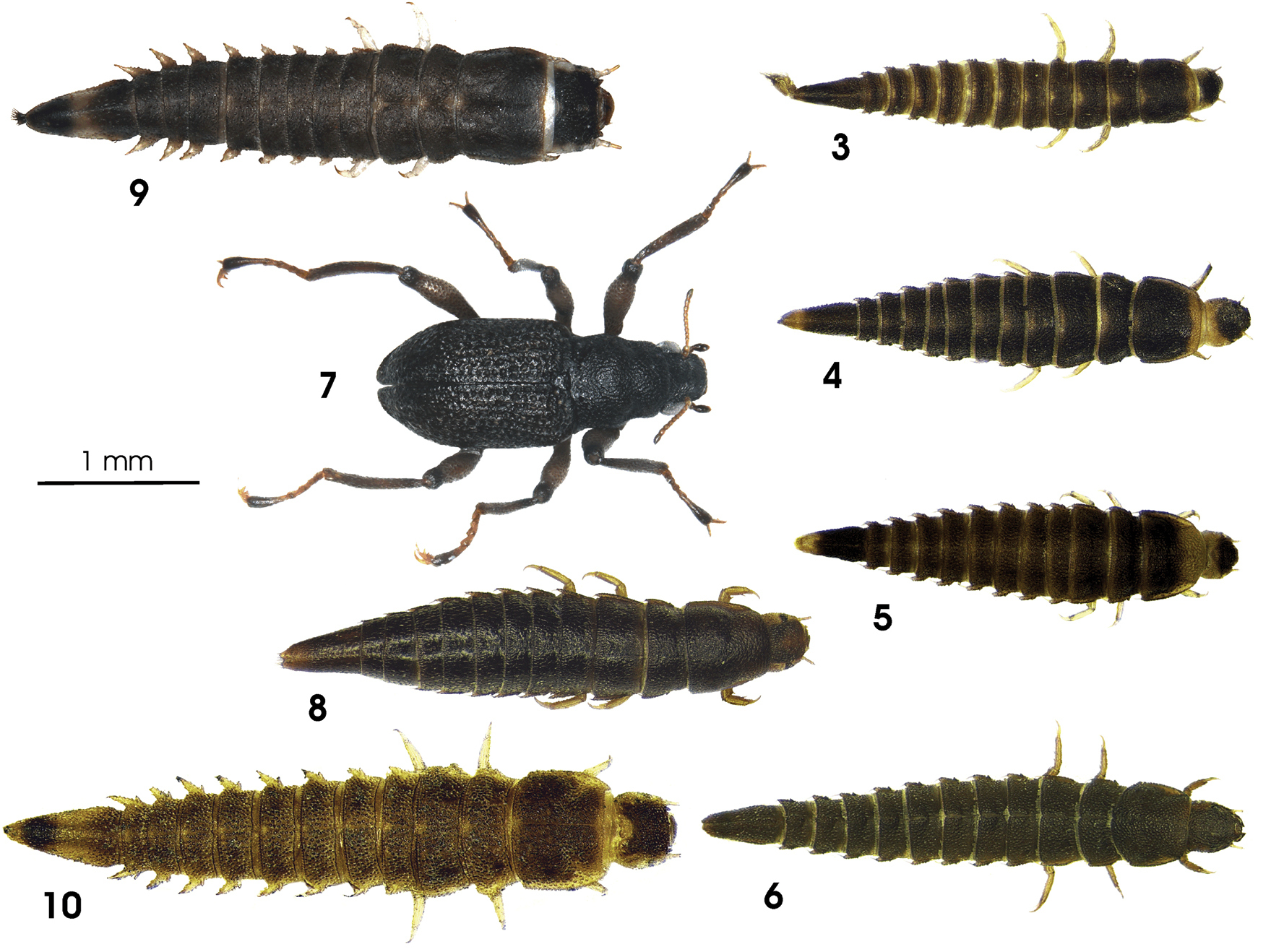 Habitus of 3 Ancyronyx minerva Freitag & Jäch, 2007, larva, 4 Ancyronyx punkti Freitag & Jäch, 2007, larva, 5 Ancyronyx pseudopatrolus Freitag & Jäch, 2007, larva, 6 Ancyronyx patrolus Freitag & Jäch, 2007, larva, 7 Ancyronyx montanus Freitag & Balke, sp. n., adult, 8 Ancyronyx montanus Freitag & Balke, sp. n., larva, 9 Ancyronyx procerus Jäch, 1994, larva, 10 Ancyronyx helgeschneideri Freitag & Jäch, 2007, larva.